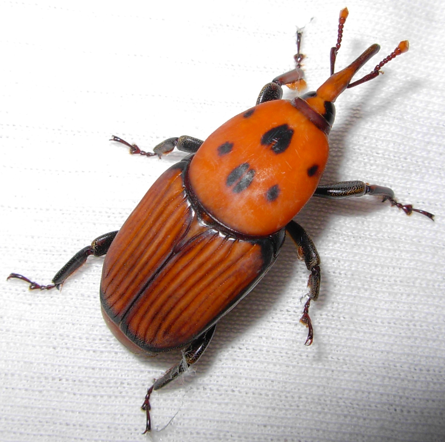 ചെമ്പന്‍ ചെല്ലി. തെങ്ങിന്‍ തടി തുളച്ച് നീര് കുടിക്കുകയും തടിക്കുള്ളില്‍ മുട്ടയിട്ട് വംശവര്‍ദ്ധന നടത്തുന്നതുമൂലം തെങ്ങിന് നാശം വരുത്തുന്ന വണ്ടാണ് ചെമ്പന്‍ ചെല്ലി. കറുത്ത ചെല്ലിയും ഇത്തരത്തില്‍ തെങ്ങിന് നാശം വരുത്തുന്നു. 4-5 സെ.മീ വലിപ്പമുള്ള പറക്കുവാന്‍ കഴിവുള്ള ഷഡ്പദമാണിത്.